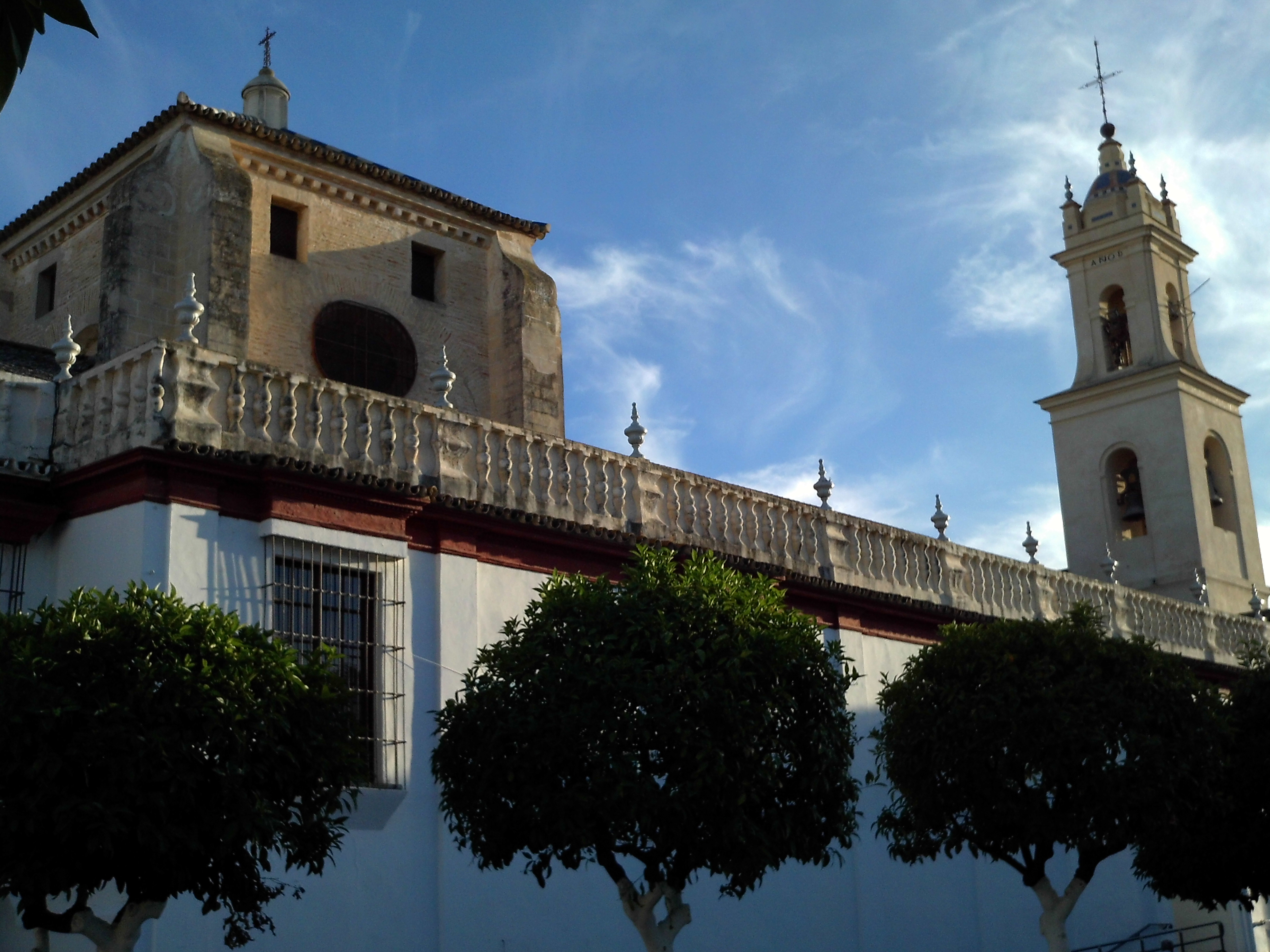 Fachada de la colegiata de Santa María de las Nieves, en la localidad sevillana de Olivares